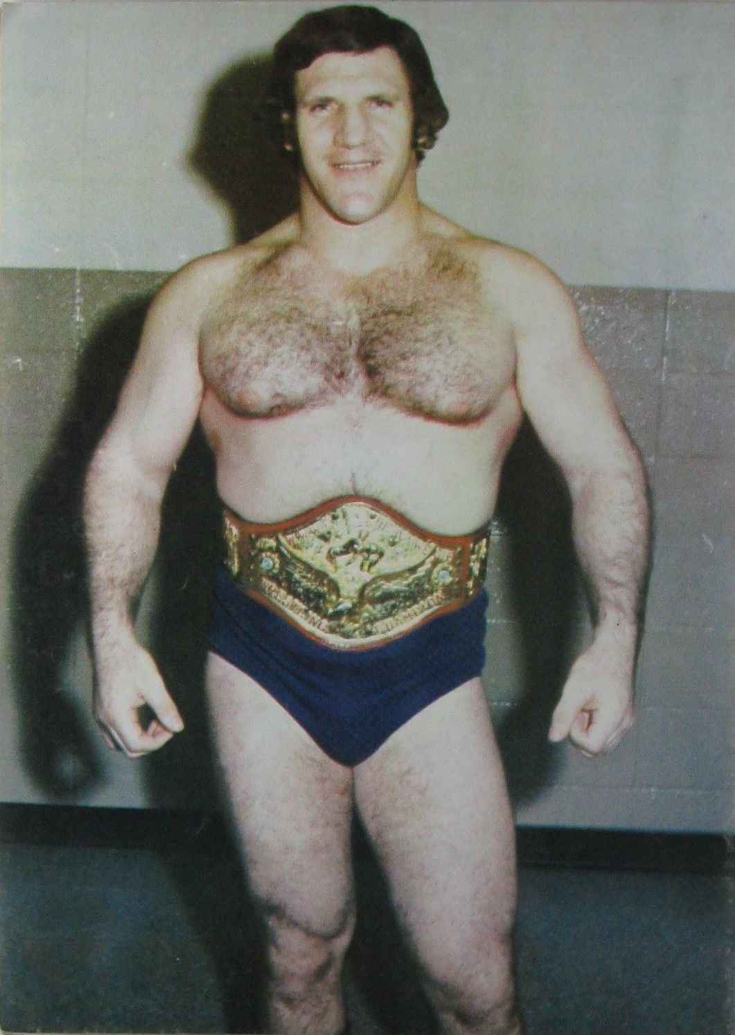 Magazine Wrestling 1 All Star Edition de 1976 avec Bruno Sammartino